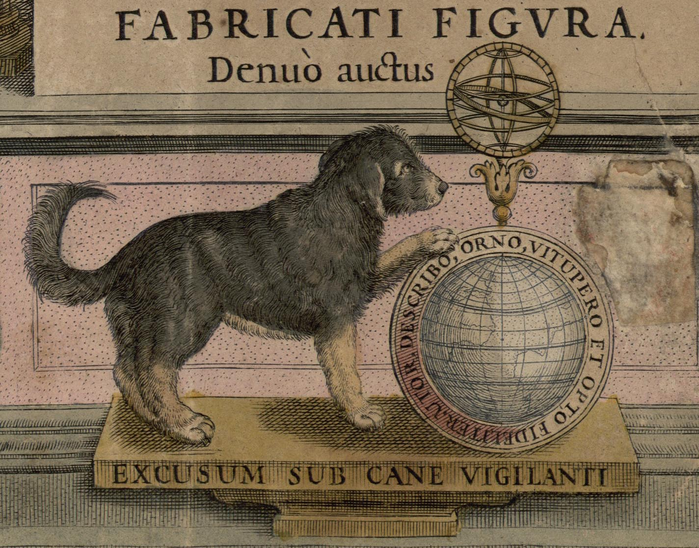 Handelsmerk van de firma Hondius, 17e eeuw